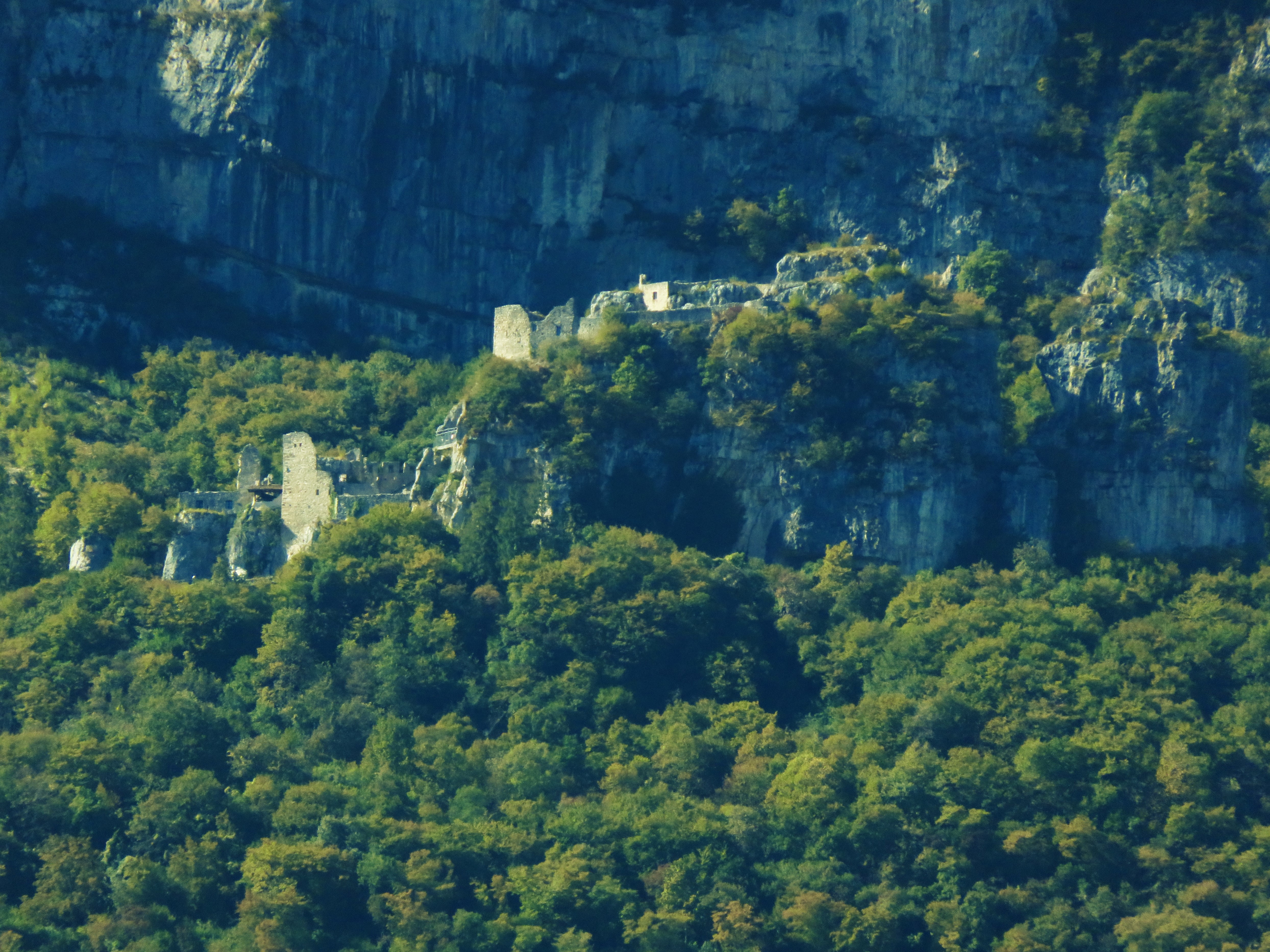 Castel Corno visto dalla valle, in basso, da Rovereto. Forse è l'ora migliore per la foto, con la giusta luce che evidenzia come il corno roccioso sia staccato dal resto del corpo del monte Biaena